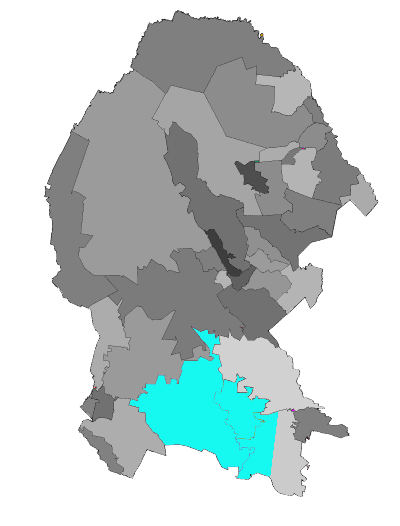 Distrito 7 Federal en Coahuila